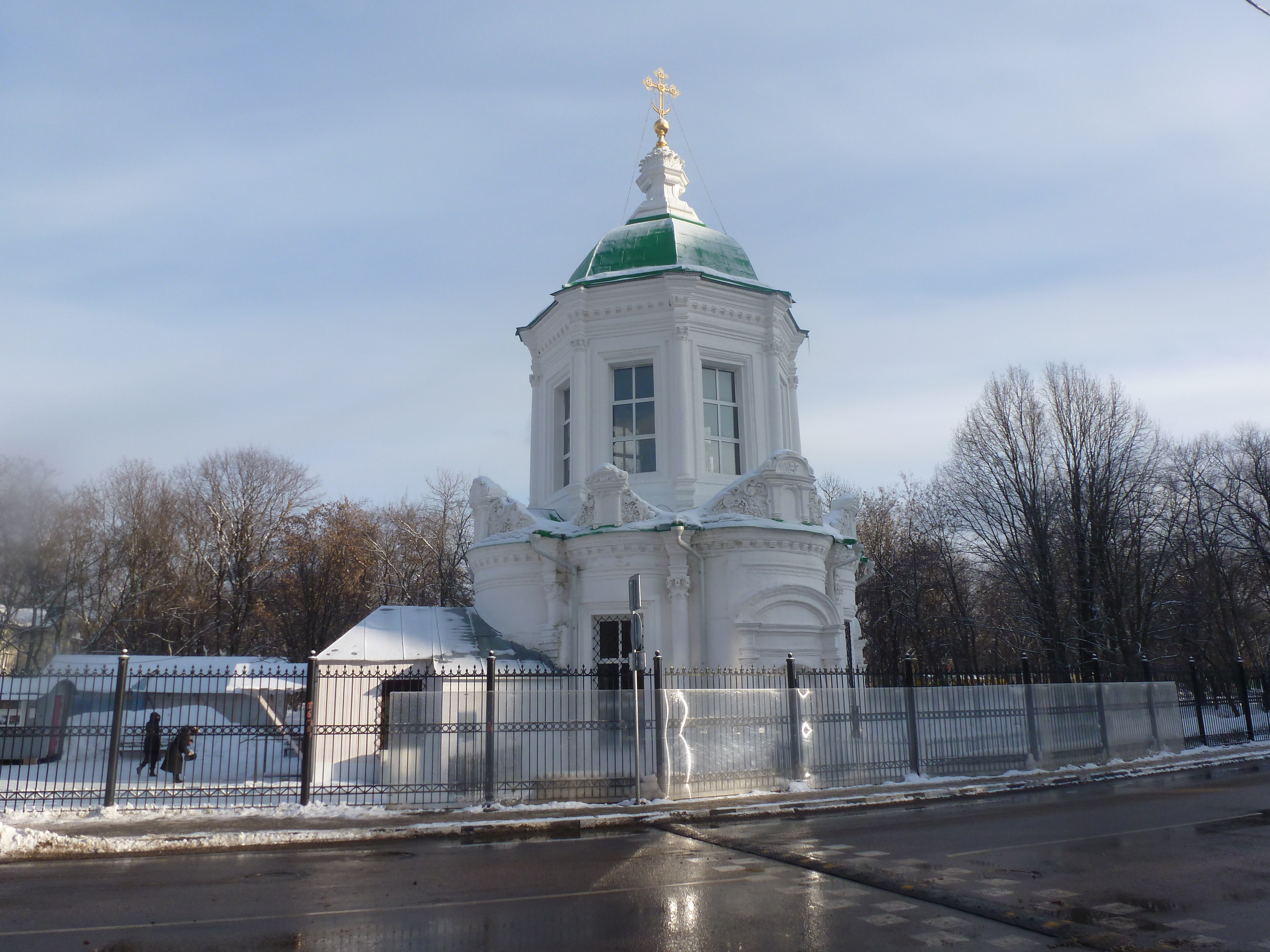 Preĝejo de Ikono de Dipatrino "Antaŭsigno" en Perovo